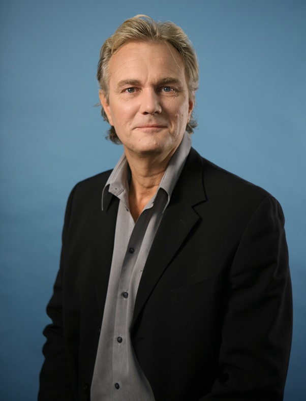 Programledaren Harald Treutiger.